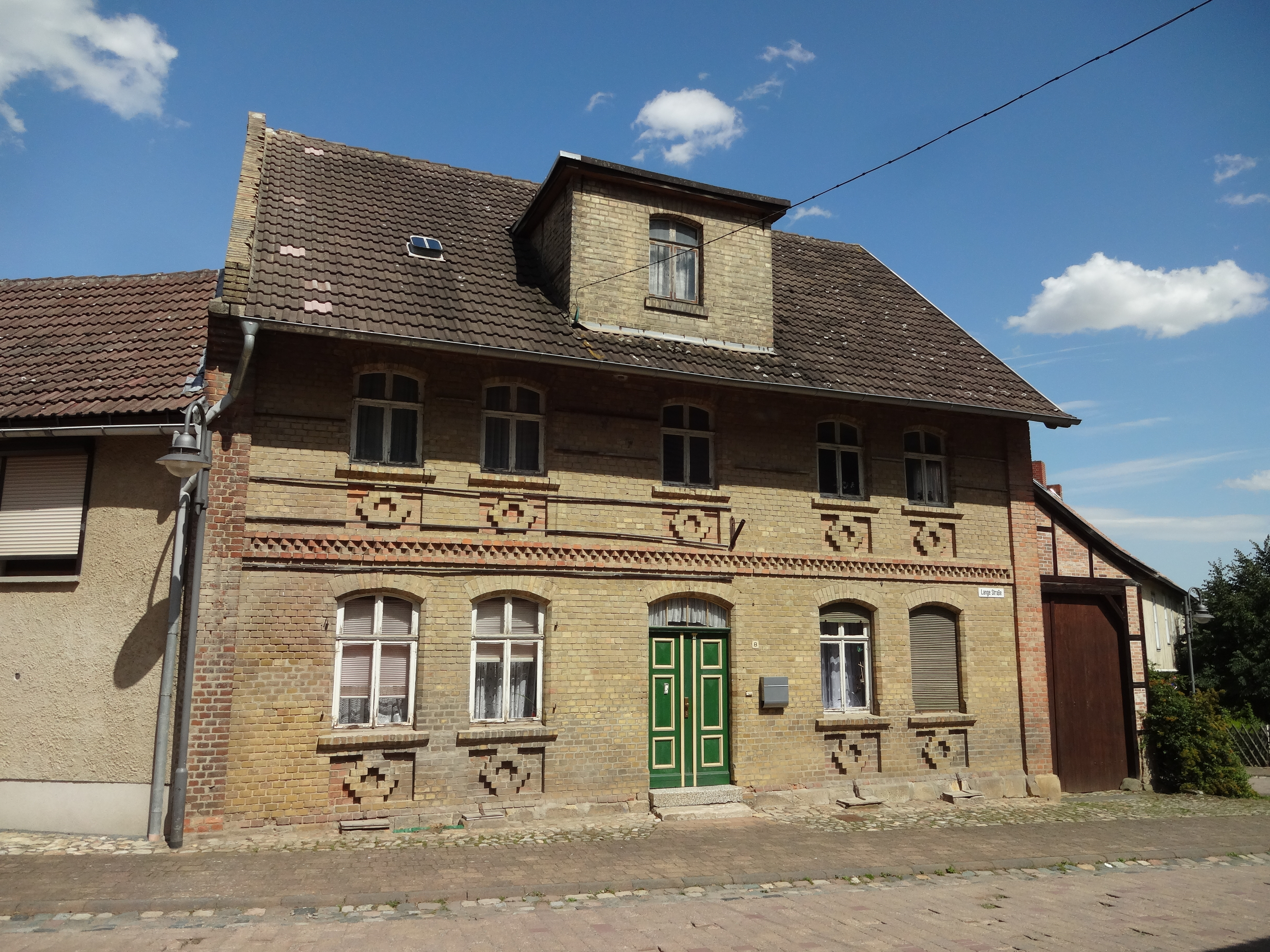 denkmalgeschütztes Wohnhaus in der Langen Straße 8 in Börnecke, Ortsteil von Blankenburg/Harz